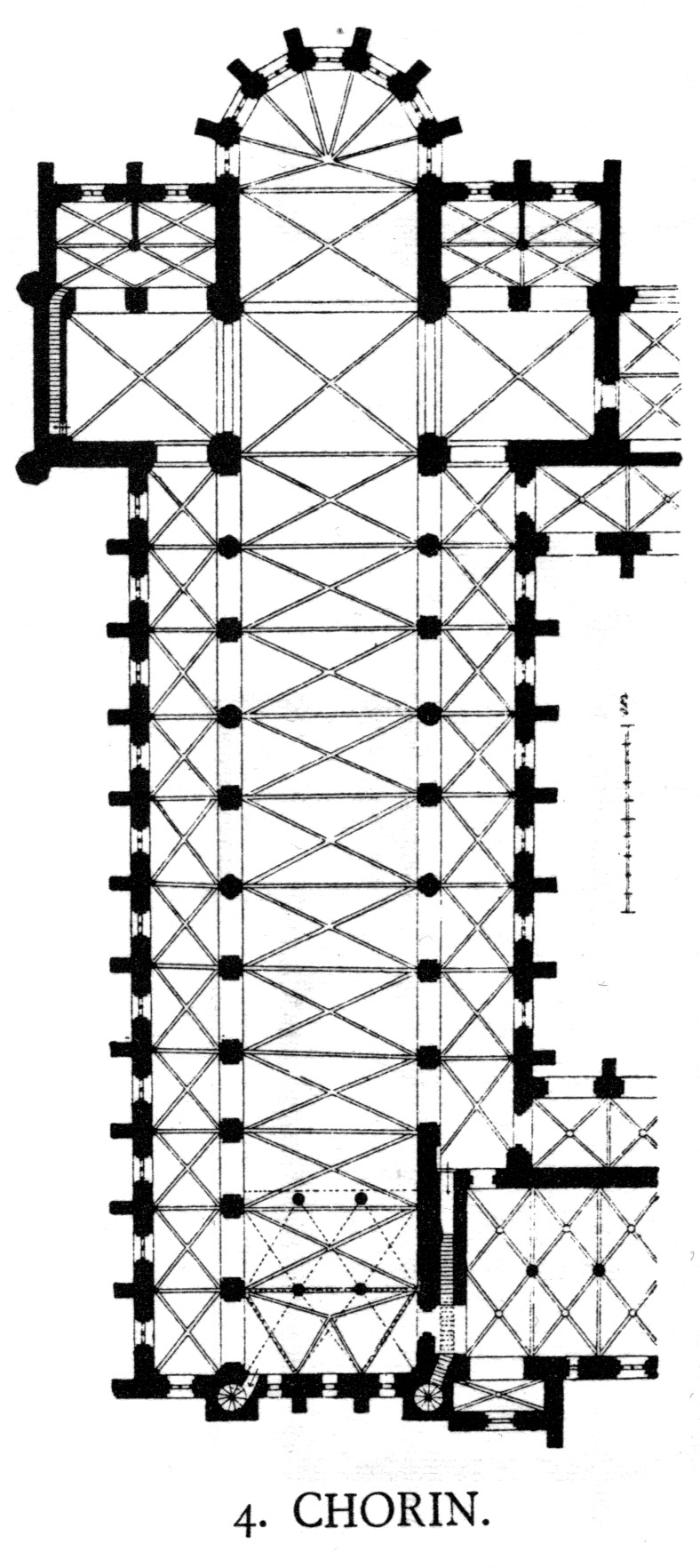 Kloster Chorin, Klosterkirche